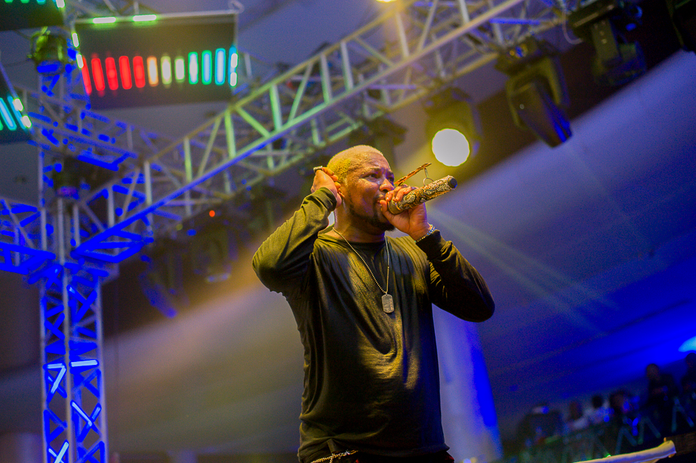 Do2tun at AMVCA 2020